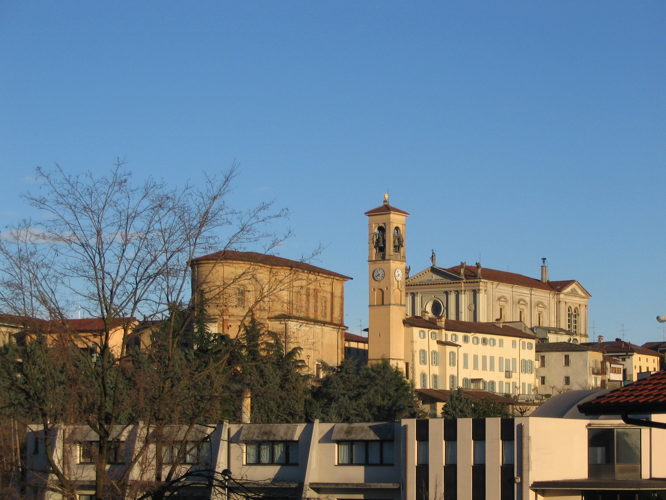 Chignolo d'Isola, panorama